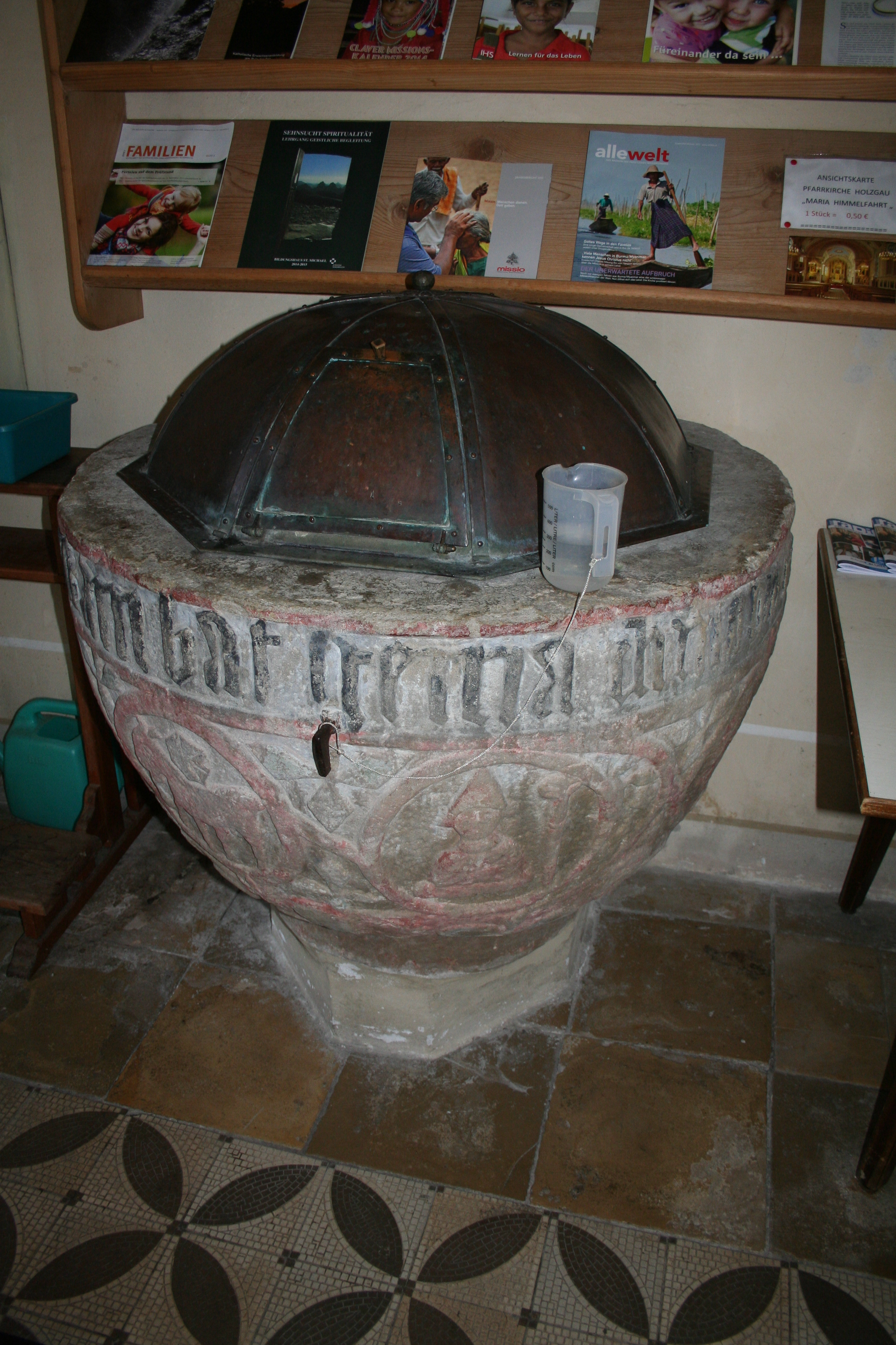 Pfarrkirche Unsere Liebe Frau Mariae Himmelfahrt, Holzgau